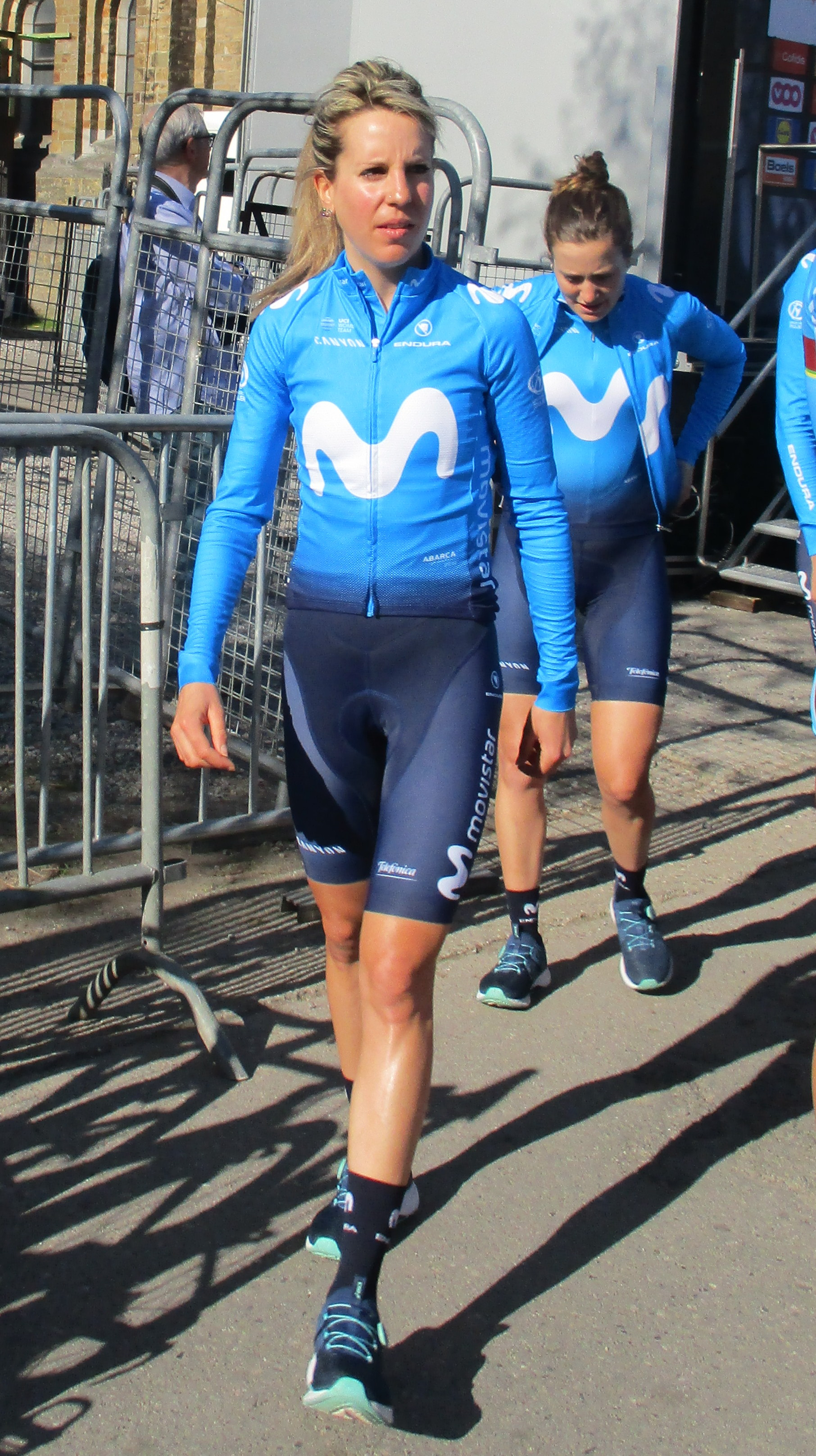 Start van de Waalse Pijl 2018 op de Mur van Huy.